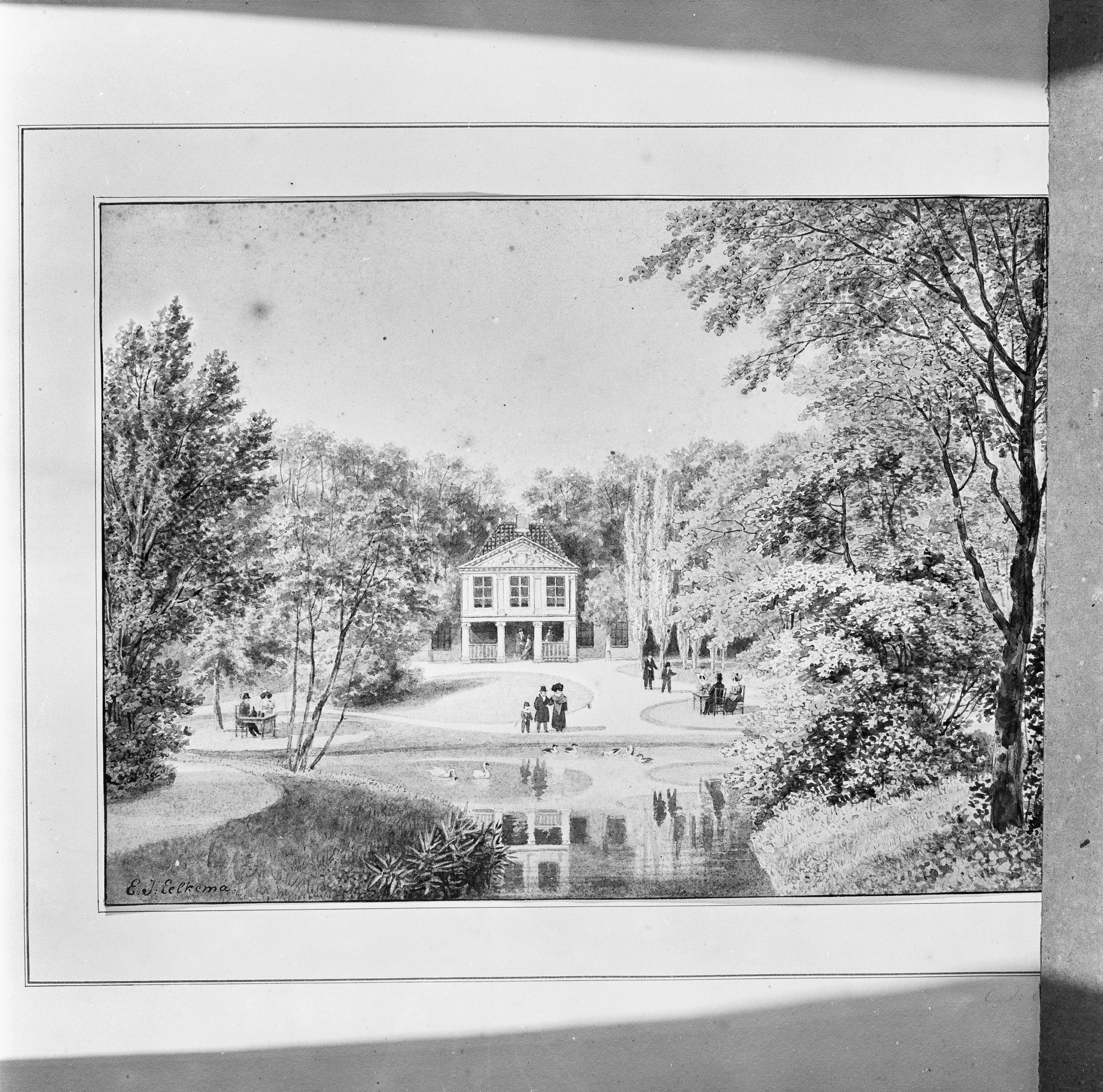 Prinsetuin: tekening door E.J. Eelkema